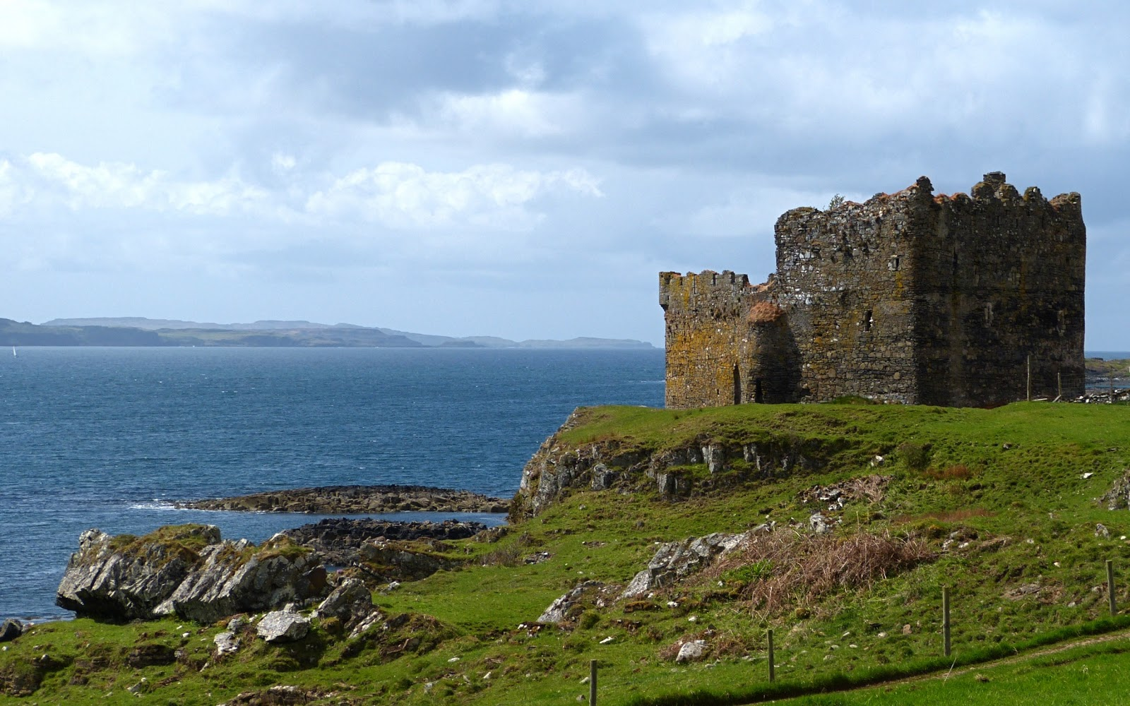 Mingary Castle, Ansicht von Nordosten